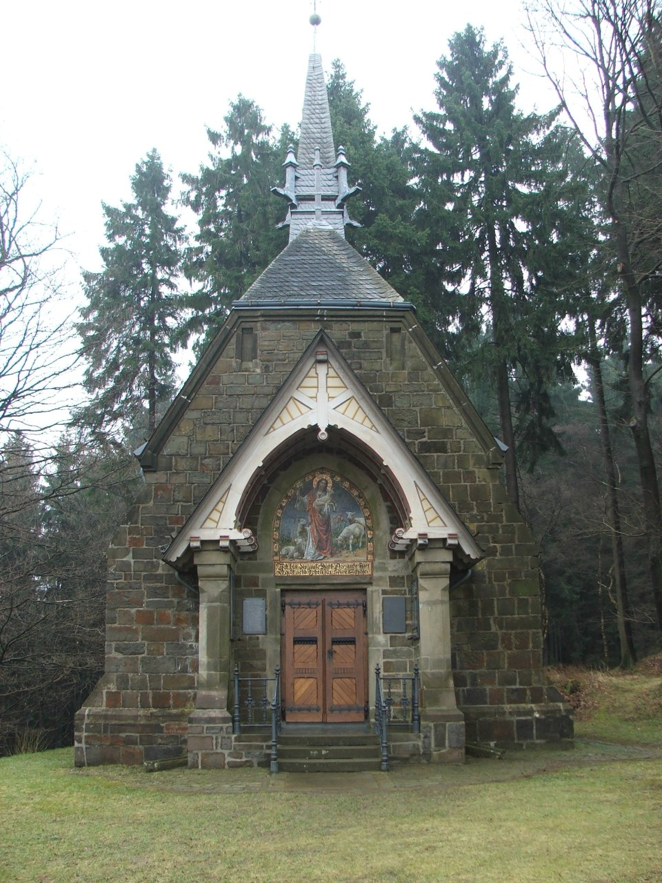 Kreuzbergkapelle in Sichtigvor/Deutschland